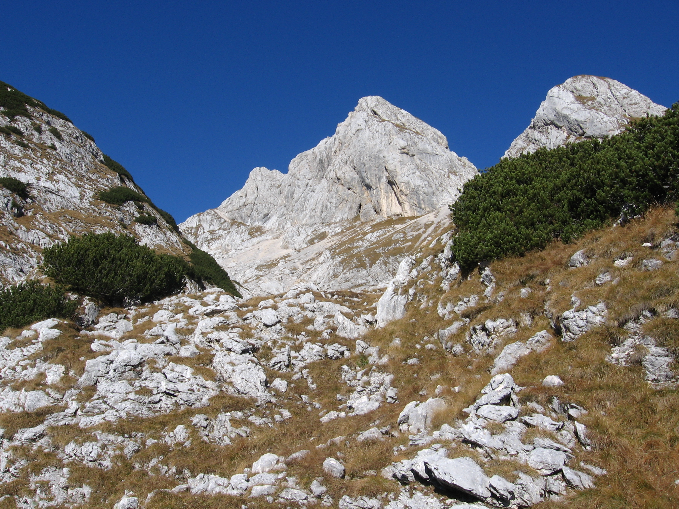 Mt. Škednjovec from south-east, Slovenia